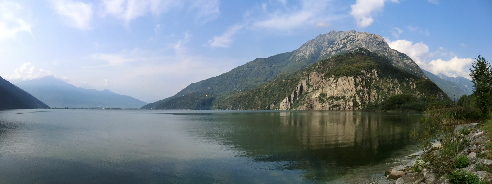 Lake Mezzola, Italy